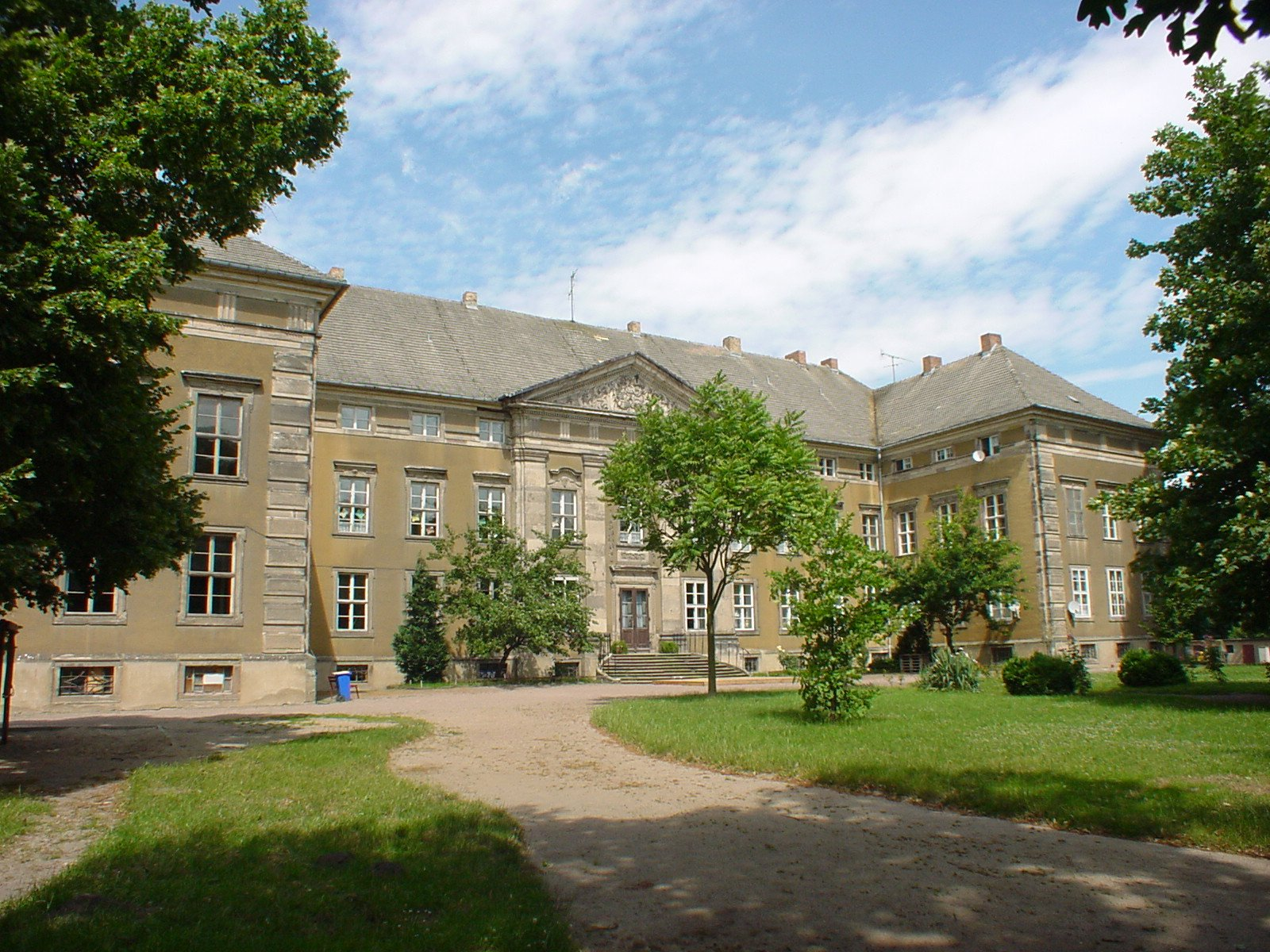 Ostrau public domain, eigenes Foto von 2004 Mewes 20:10, 13. Feb 2005 (CET)